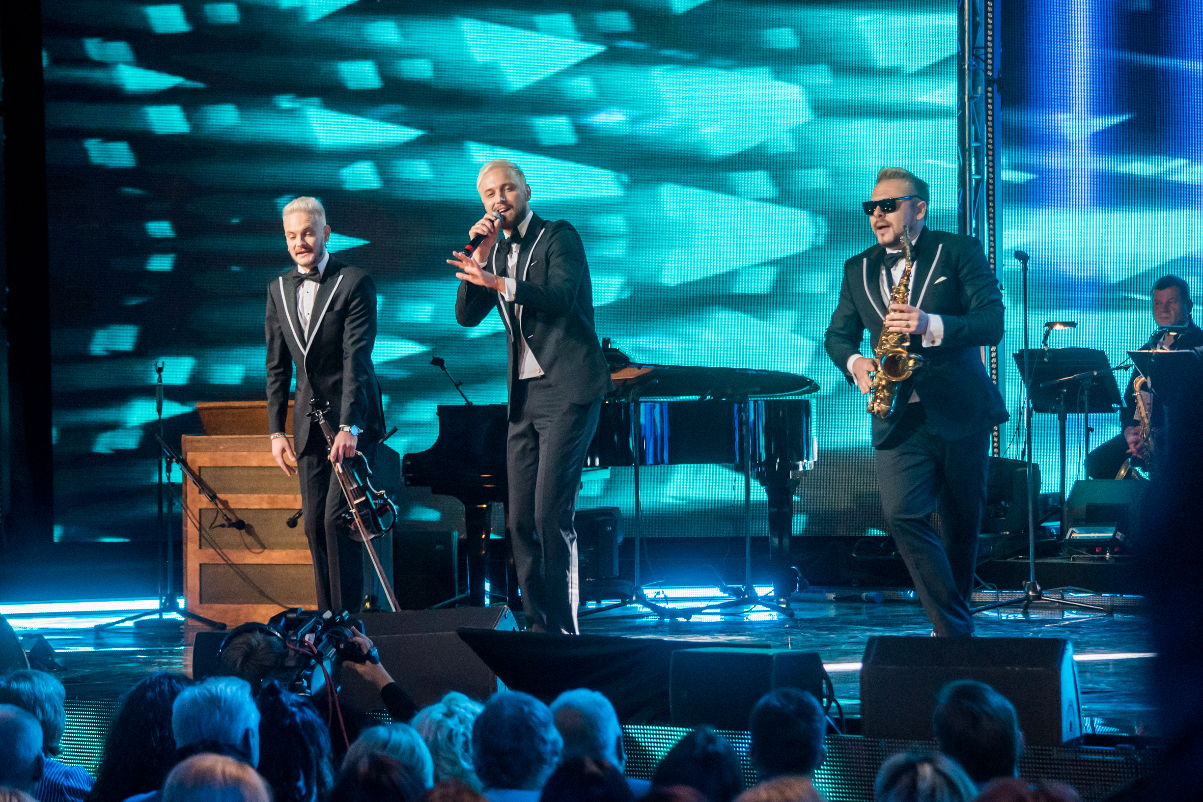 Sunstroke Project на фестивале «Лайма. Рандеву. Юрмала 2017»